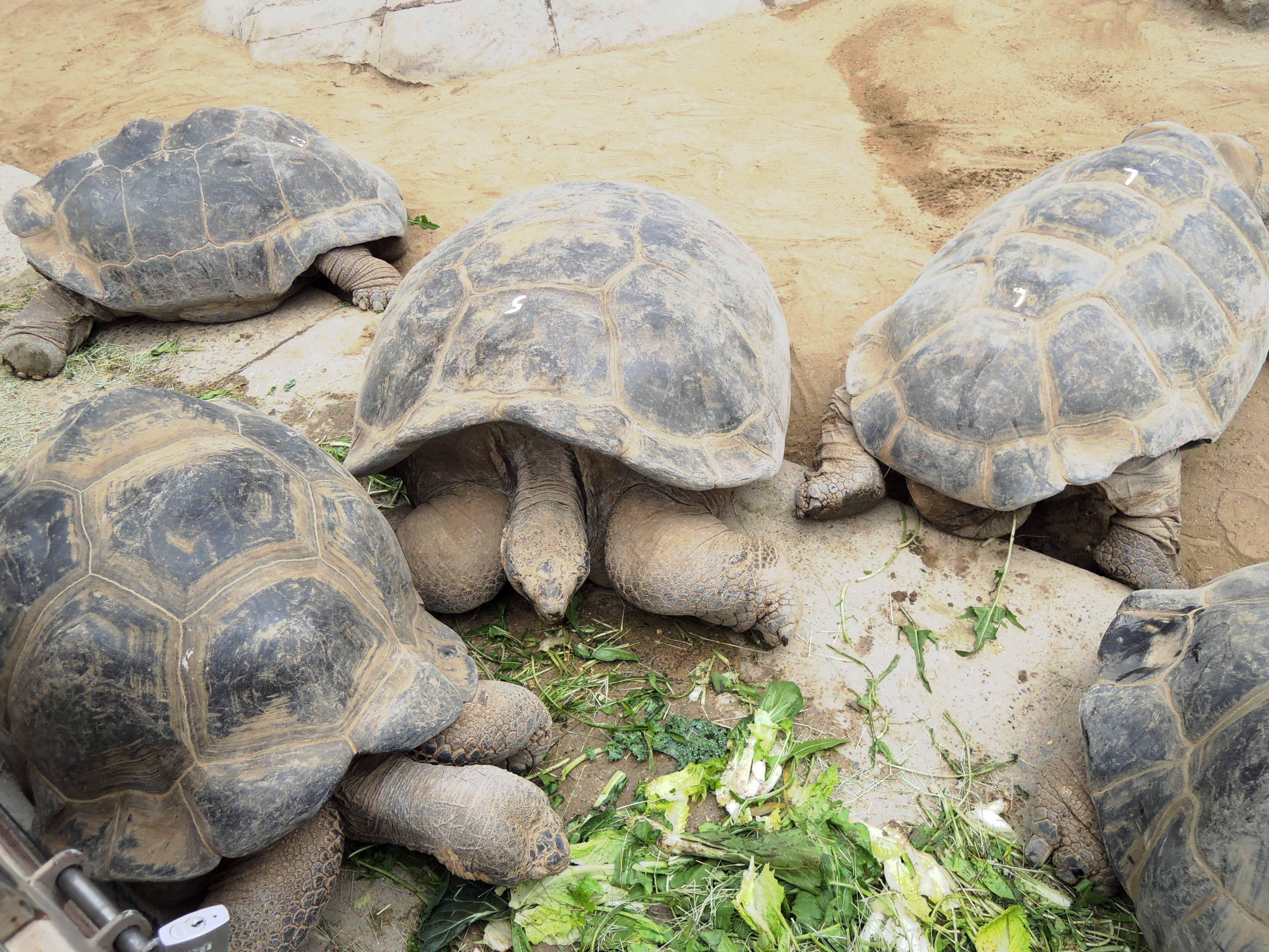 Tortue géante des Galápagos (Chelonoidis nigra) au zoo de San Diego.